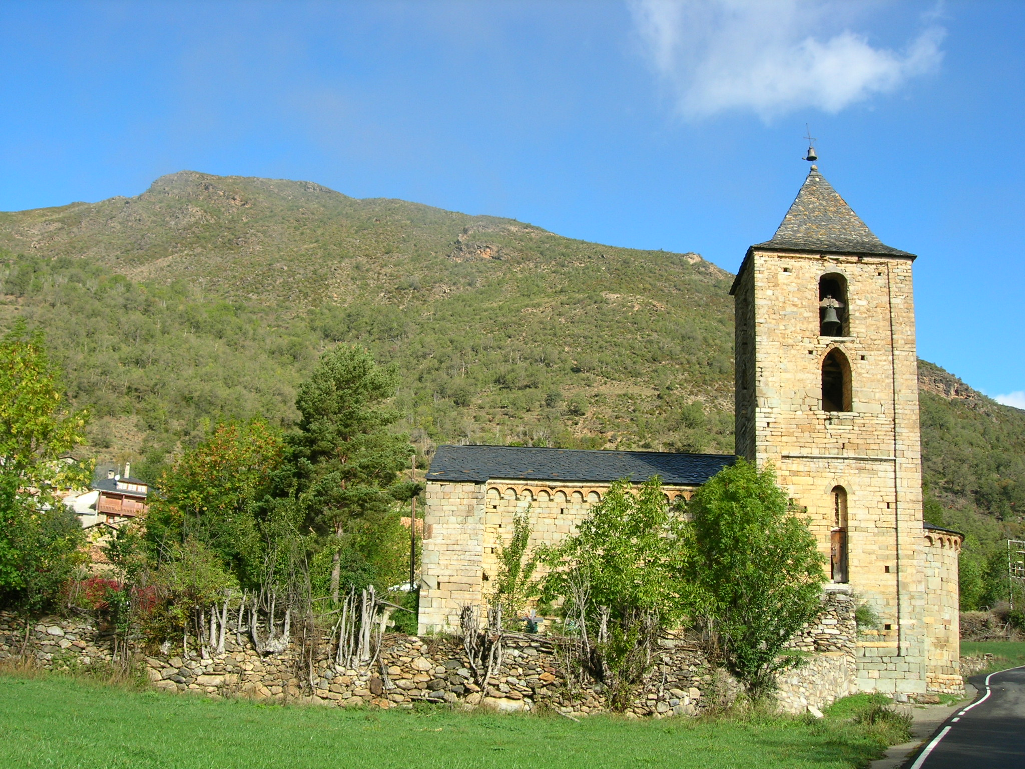 Església de l'Assumpció de Cóll (la Vall de Boí)